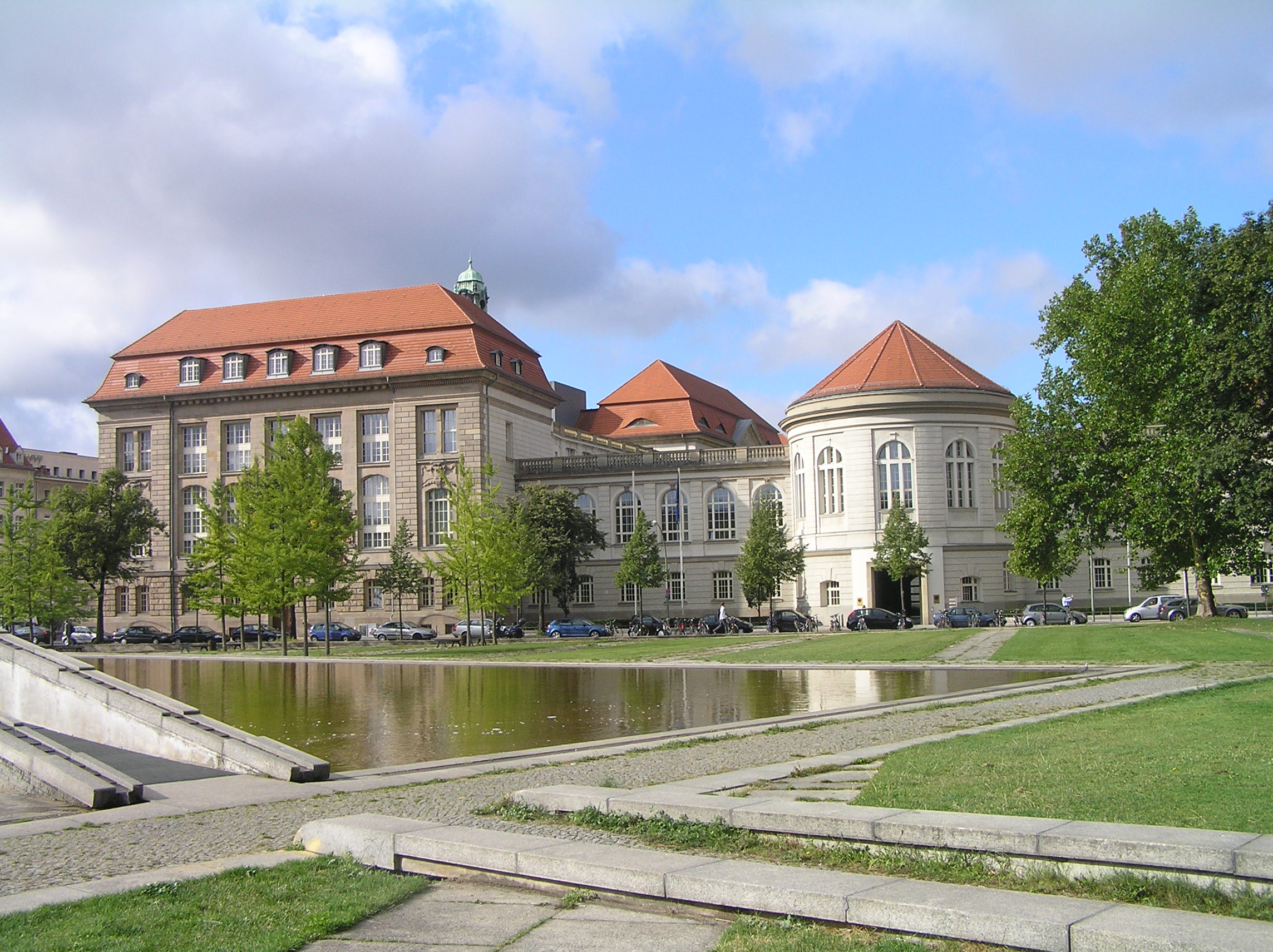 Berlin, Scharnhorststraße: Seitenansicht des Bundesministeriums für Wirtschaft, früher Kaiser-Wilhelm-Akademie. Das Bild zeigt das heutige Gebäude B des Ministeriumskomplexes. Rund um den Mittelpavillion waren früher die Hörsäle der Hochschule untergebracht. Die Einfahrt im Rundbau führt auf den 5.000 qm großen Goerkehof im Inneren des Ministeriums.